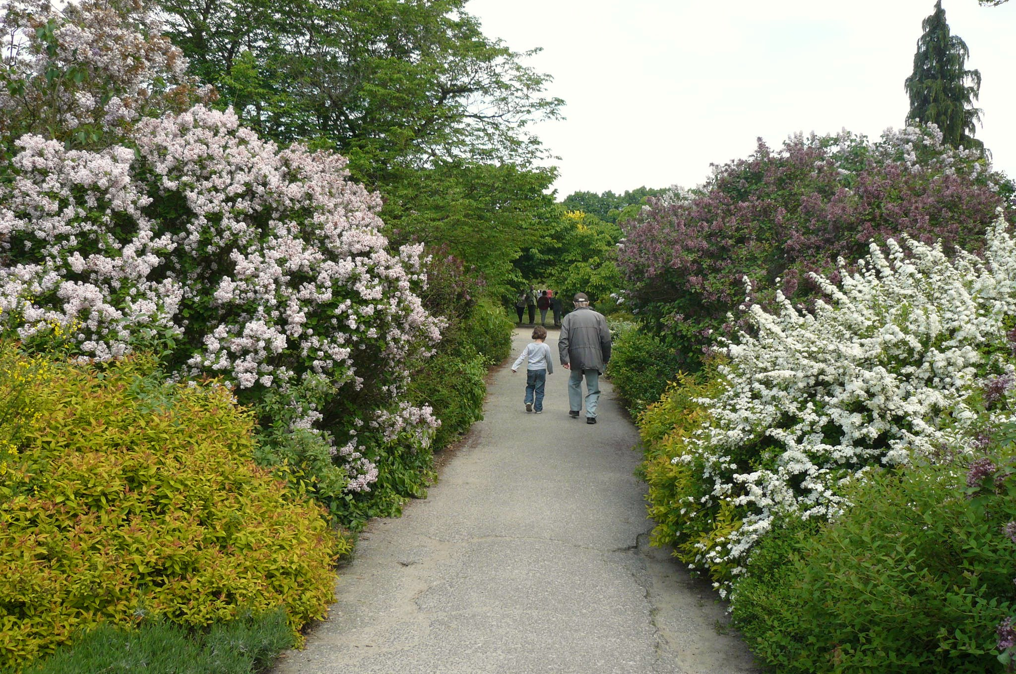 Arboretum w Kórniku w maju.